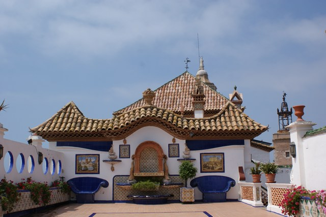 Terrasses del Palau Maricel de Sitges amb teulada aiguavés